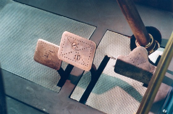 Mercedes-Simplex, Kupplung (links) und die Pedale fuer die zwei unabhaengig voneinander arbeitenden Aussenband-Bremsen am Getriebe